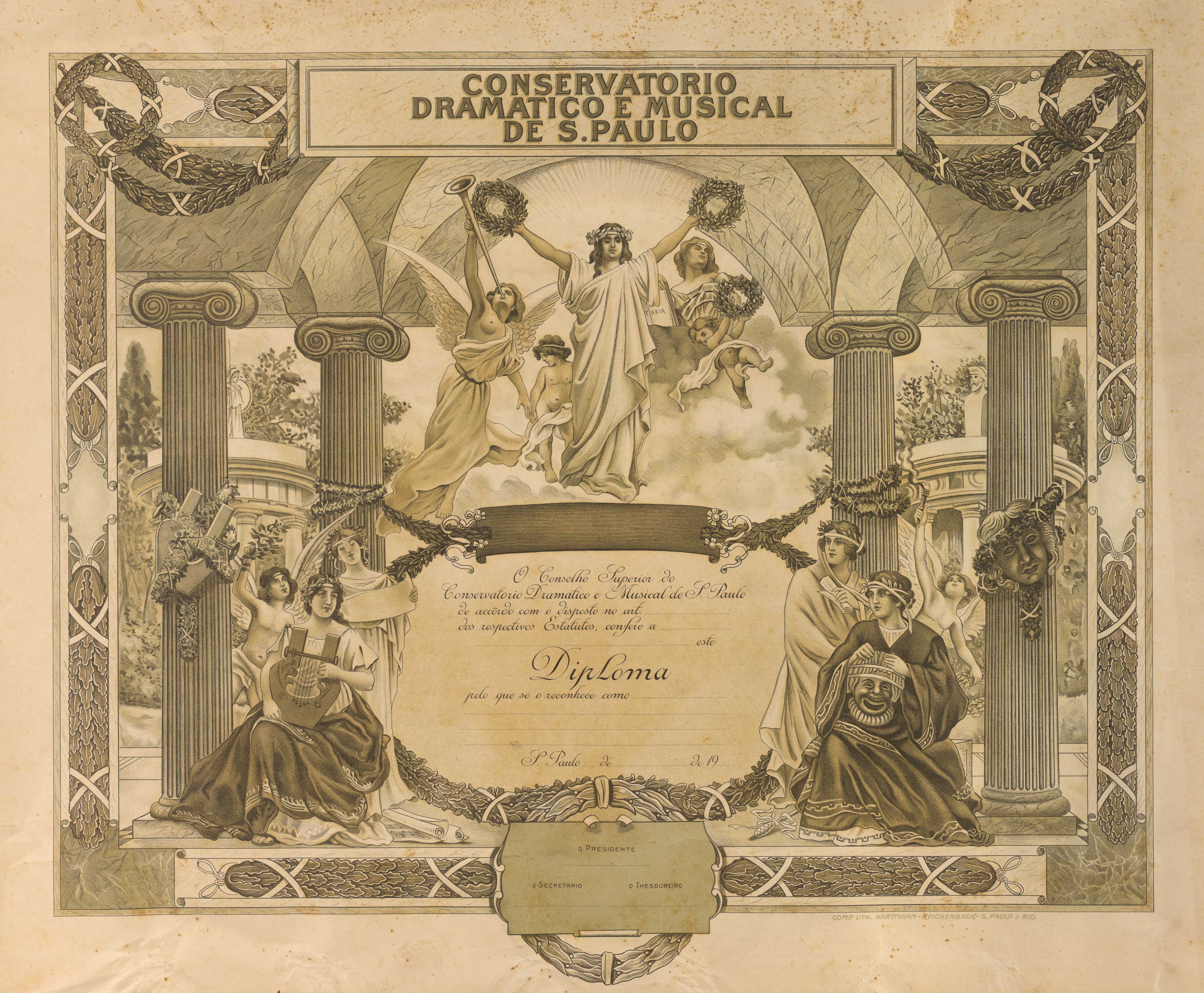 Modelo de diploma do Conservatório Dramático e Musical de São Paulo. 1 diploma: litograv., mon.(verde); 45,1 x 57,6cm em papel 52,7 x 63,8cm (2ex.).